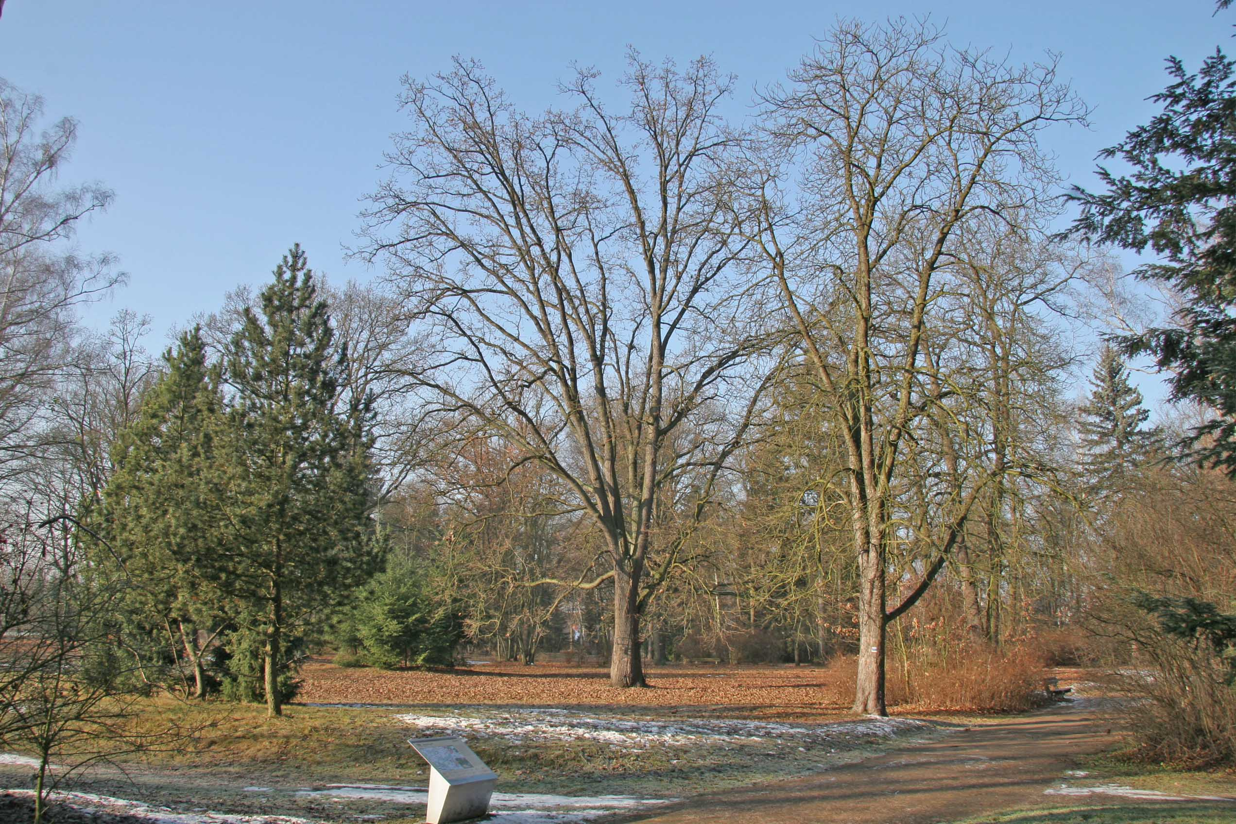 Lázeňský park v Lázních Bohdaneč autor:Zp